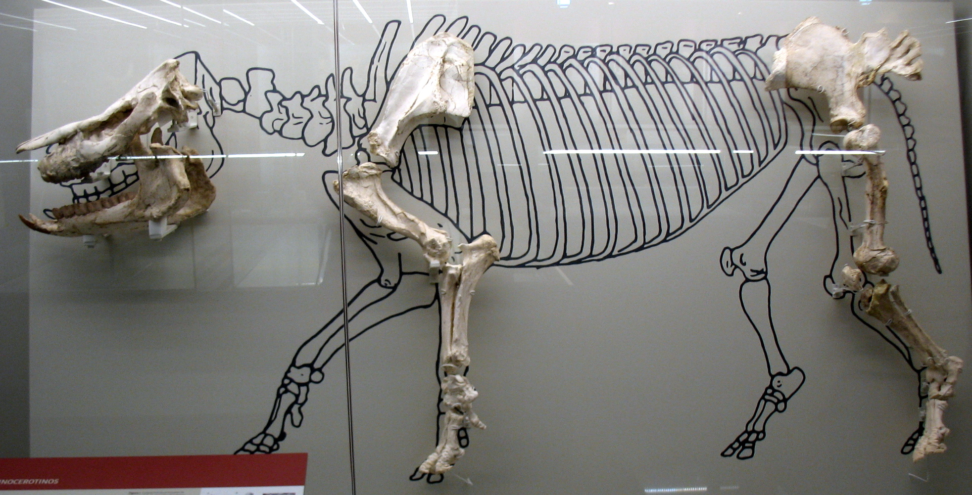 Montaje del esqueleto de Aceratherium incisivum con restos fósiles de un único individuo encontrados en conexión anatómica. Yacimiento Batallones 1, Torrejón de Velasco, Madrid, España. Exposición temporal "La colina de los tigres dientes de sable. Los yacimientos miocenos del cerro de los Batallones (Torrejón de Velasco, Comunidad de Madrid)" en el Museo Arqueológico Regional (MAR), Alcalá de Henares (Madrid)